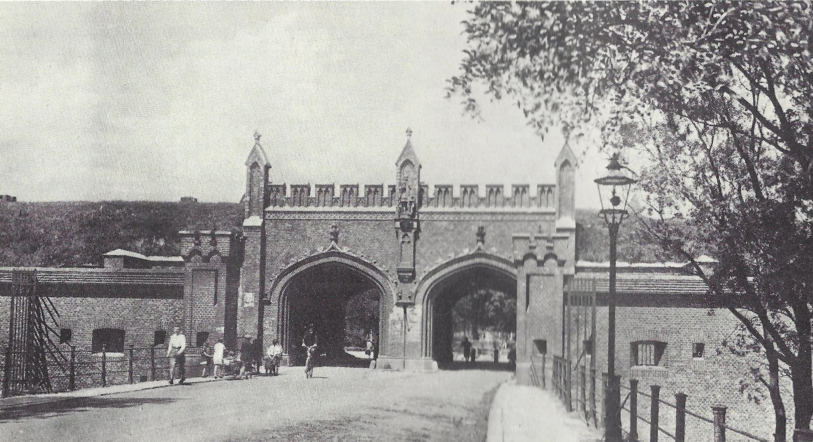 Fotografie des Friedländer Tors in Königsberg